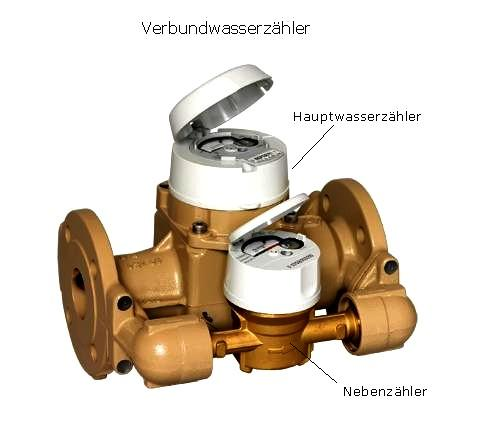 Verbundwasserzähler bestehende aus Haupt- und Nebenzähler